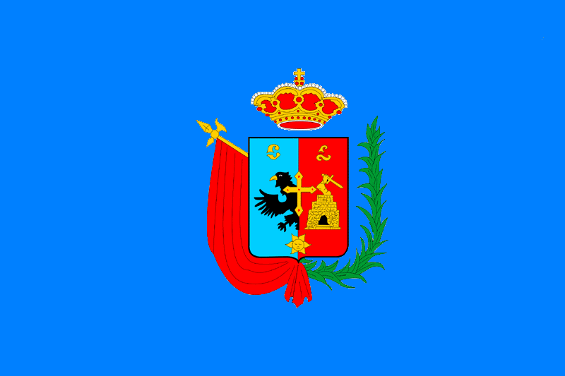 Esta es la bandera de la ciudad de Cajamarca, capital del Departamento de Cajamarca.